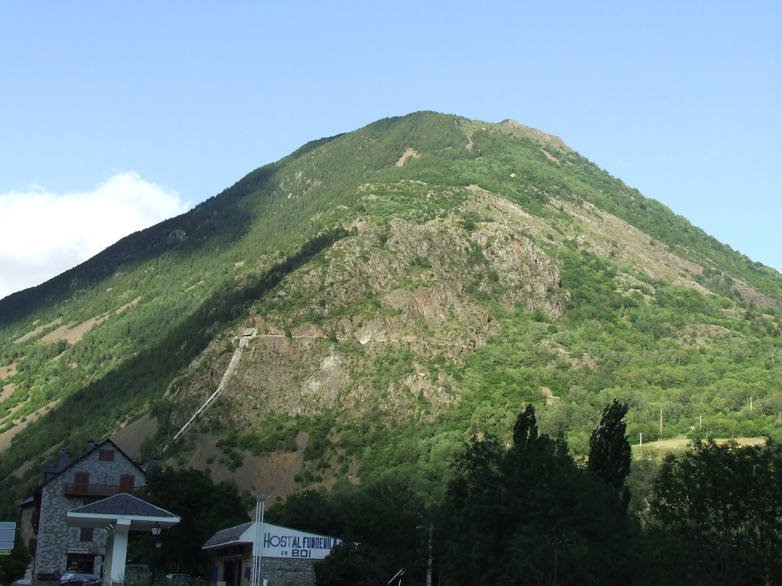 La Roca de la Feixa, de Barruera (Alta Ribagorça)